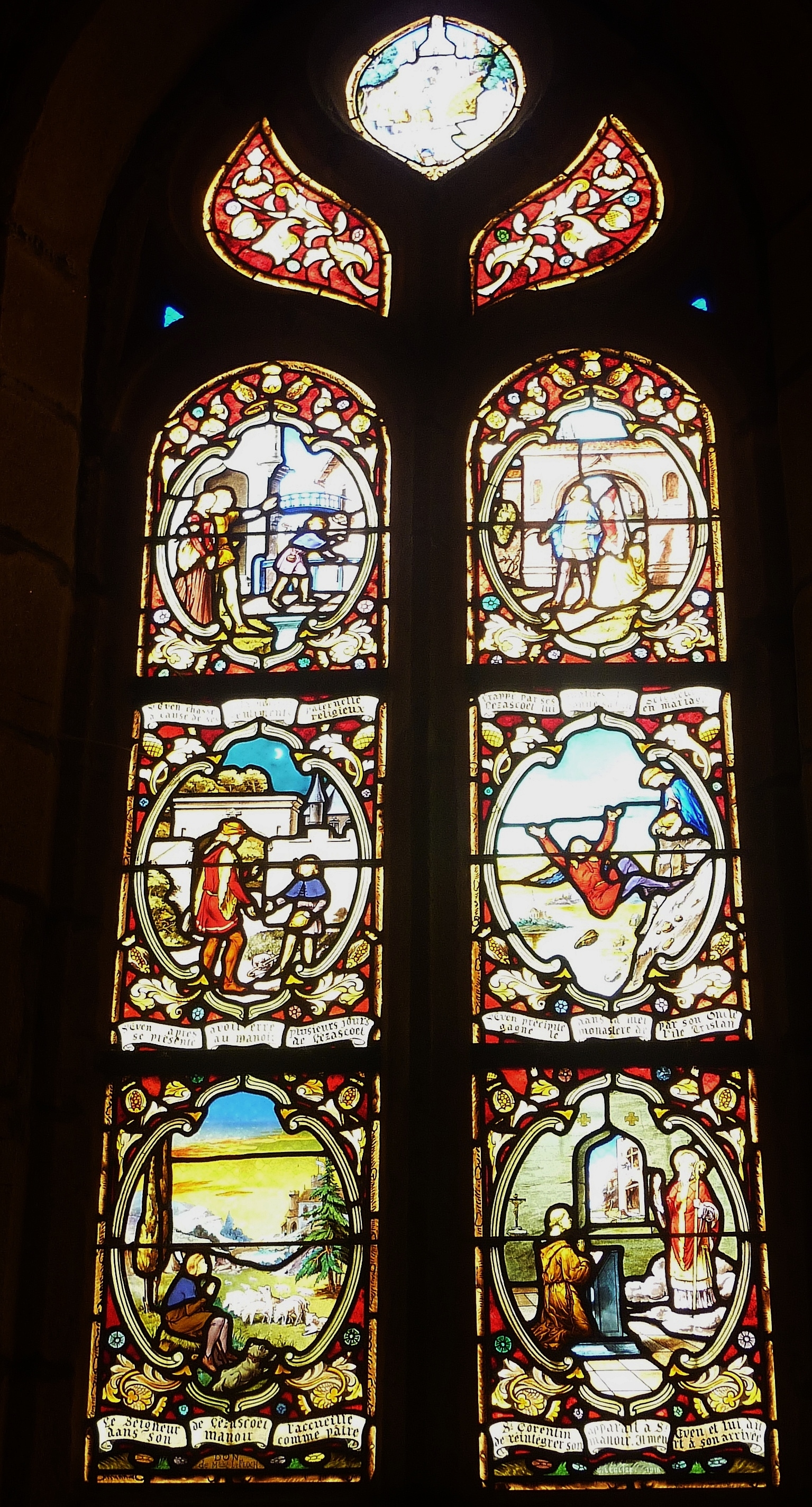 Kerlaz : église Saint-Germain, vitrail de Gabriel Léglise illustrant la vie légendaire de saint Even et portant le texte suivant : "Chassé de la maison paternelle à cause de ses penchants religieux, Even, après avoir erré plusieurs jours, se présente au manoir de Lezascoët. Le seigneur de Lézascoët l'accueille dans son manoir comme pâtre. Frappé par sa bonté et sa science, le seigneur de Lézascoët lui donne sa fille en mariage. Even, précipité dans la mer par son oncle, gagne le monastère de l'Île Tristan. Saint Corentin apparaît à saint Even et lui dit de réintégrer son manoir. Il meurt à son arrivée".